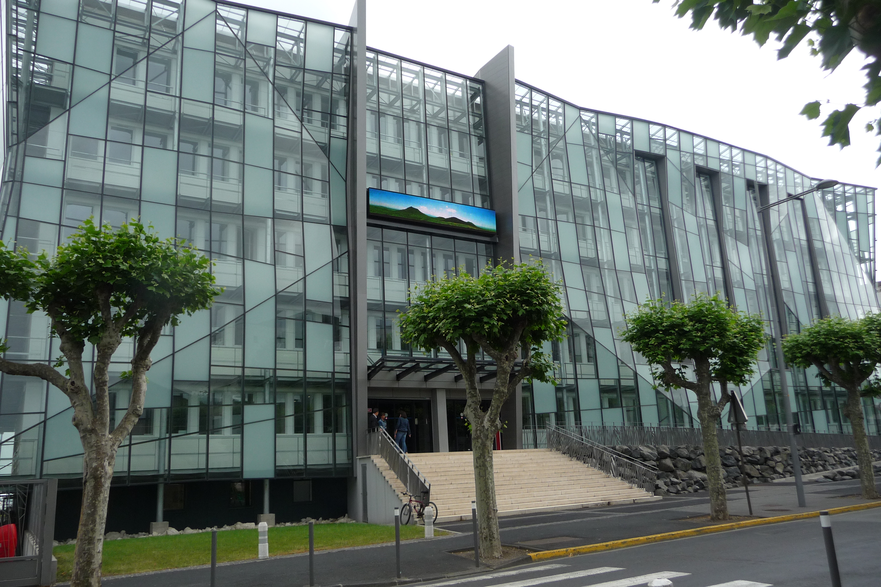 Locaux du journal La Montagne, rue du Clos Four, à Clermont-Ferrand.